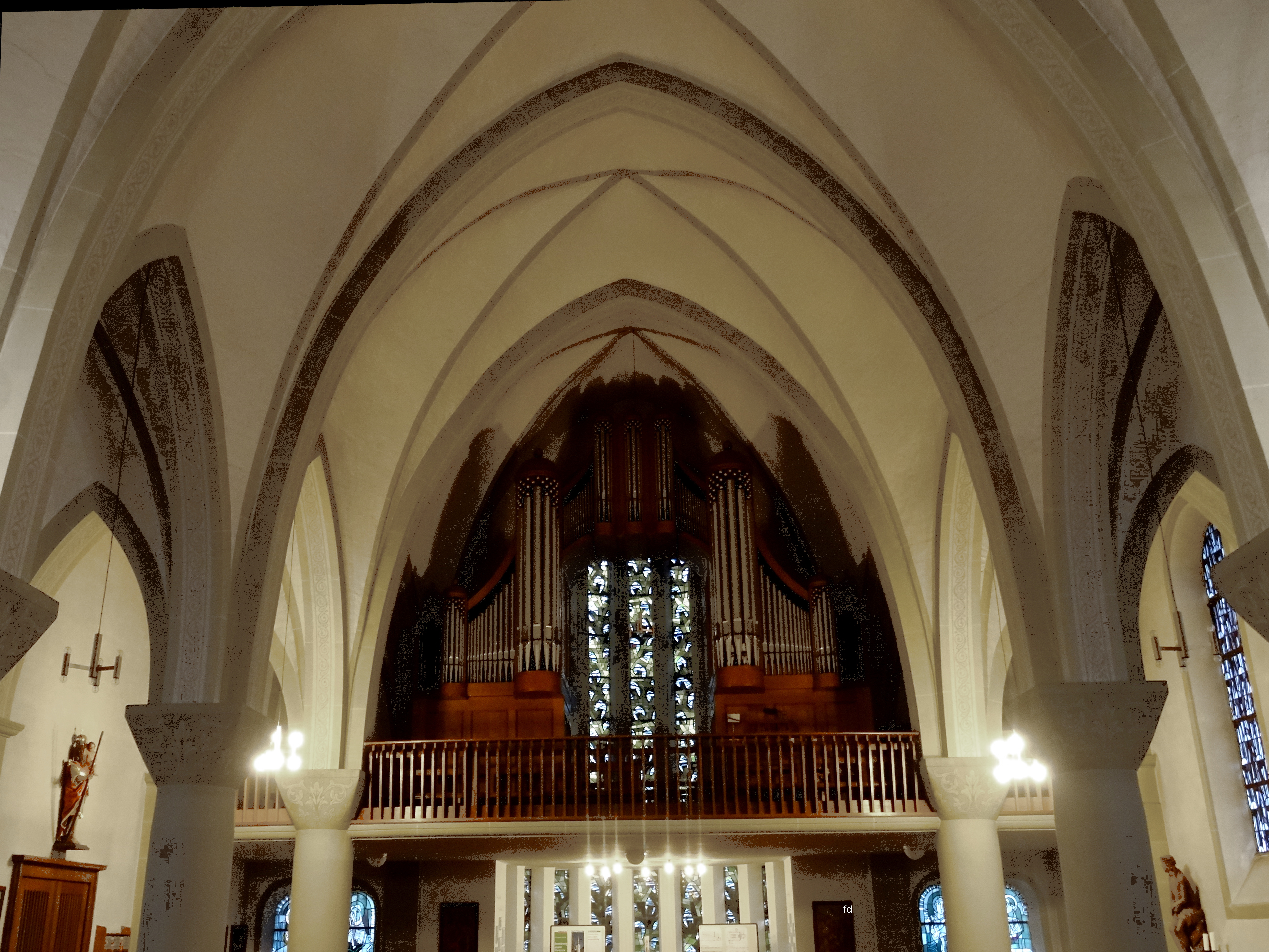 St. Christophorus Hirschberg Orgel.